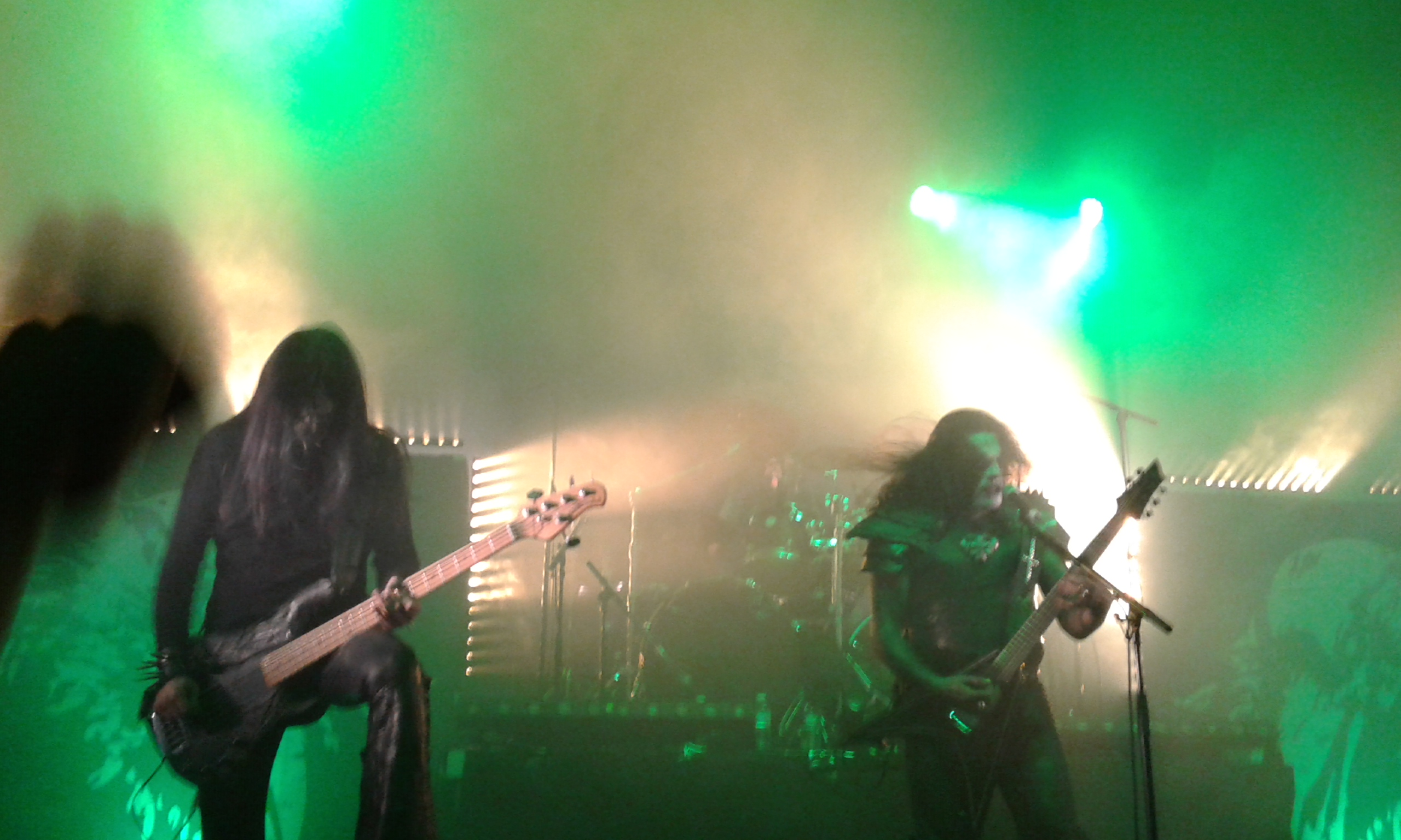 King Ov Hell (gauche) et Abbath (droite) à La Cigale le 09/02/2016